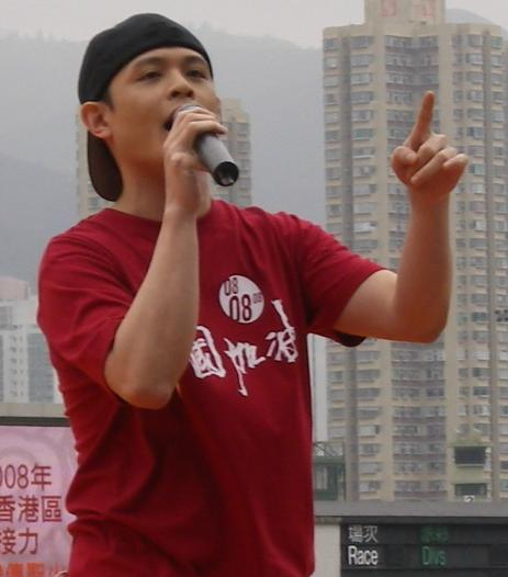 Justin Lo